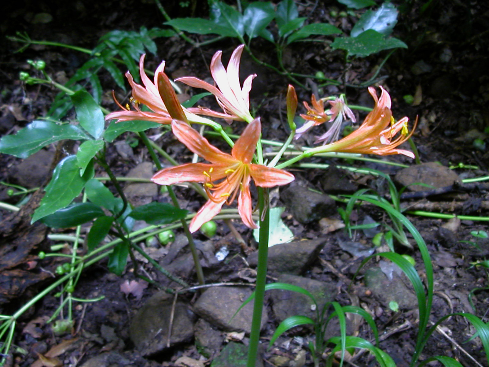 キツネノカミソリ(Lycoris sanguinea): 静岡県松崎、日本/Matsuzaki, Shizuoka pref. Japan